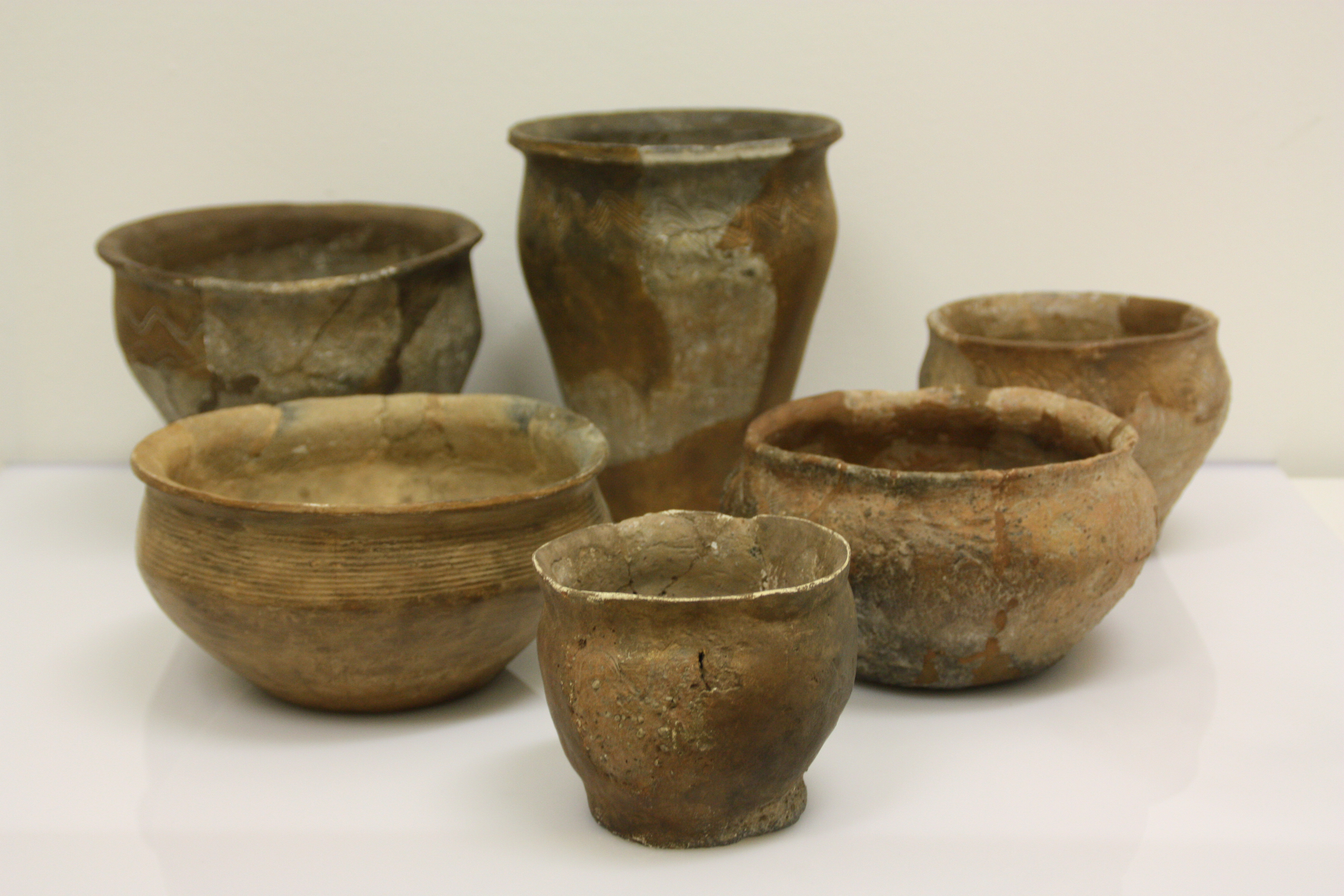 Jena-Lobeda, Johannisberg. Frühmittelalterliche Keramik slawischer Herstellungstradition.